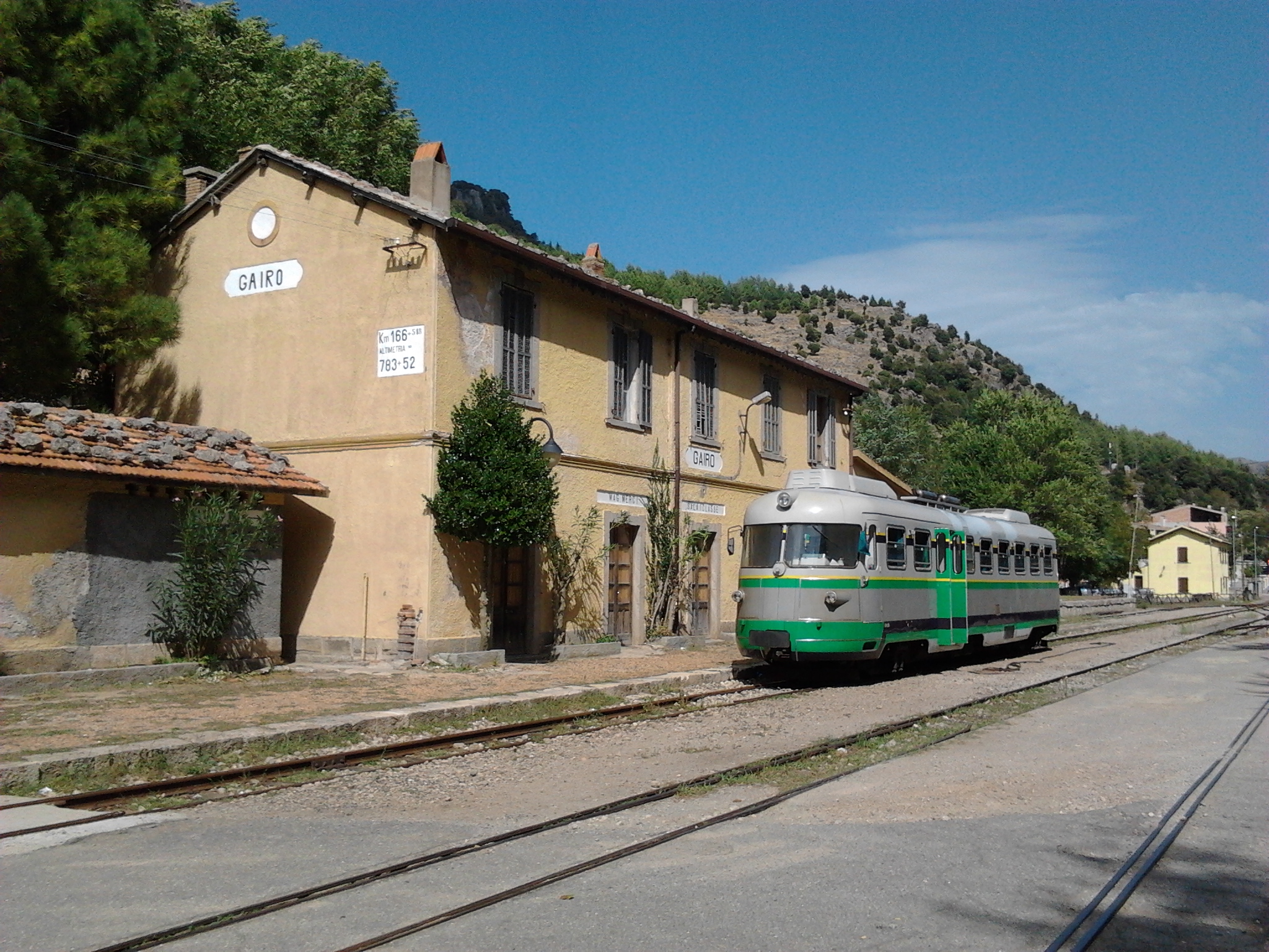 Stazione ferroviaria di Gairo Taquisara, in sosta un'automotrice serie 01 ÷ 20